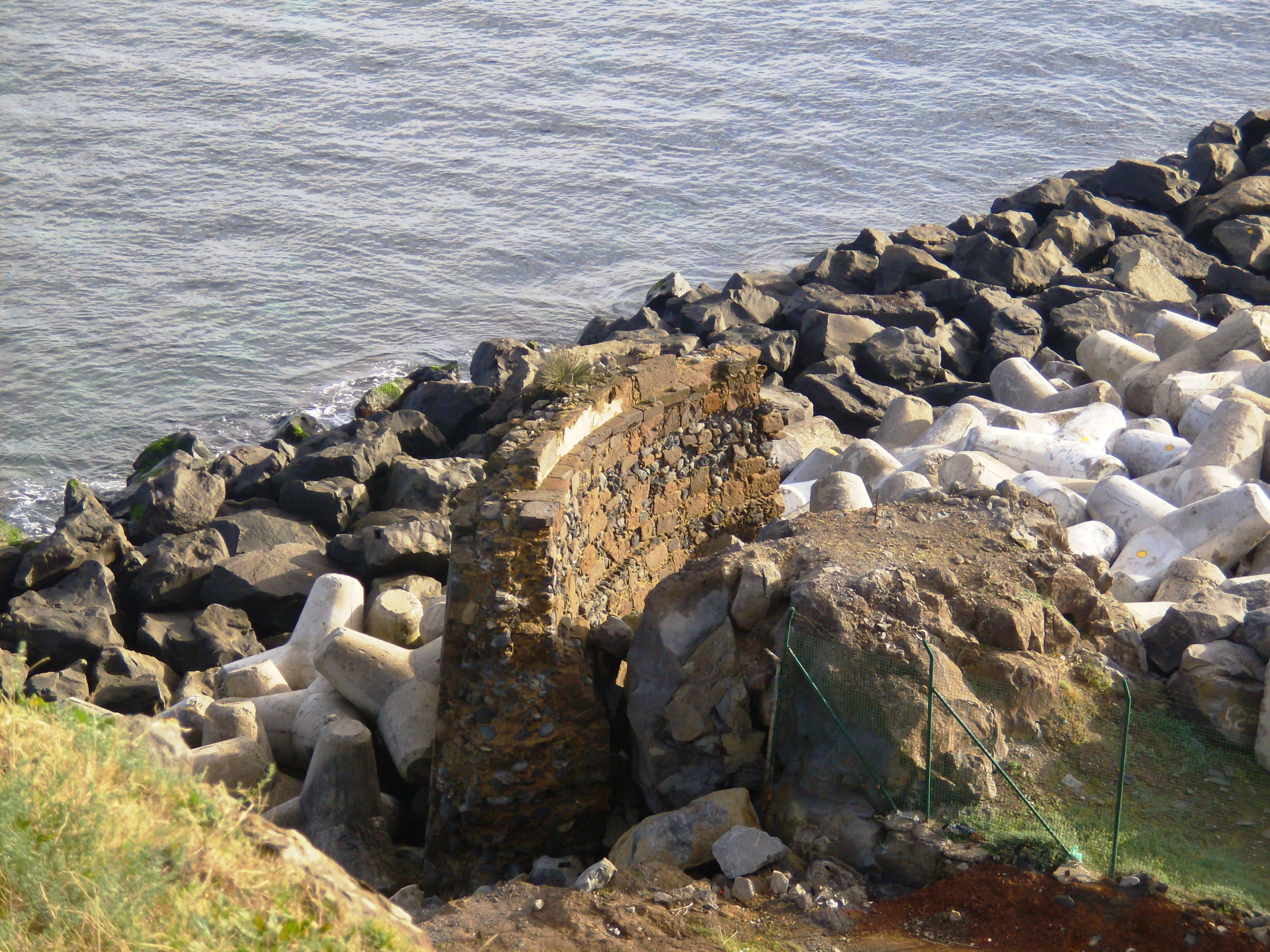 Forte do Espírito Santo, Praia da Vitória, Ilha Terceira, Açores: detalhe do troço remanescente da muralha.